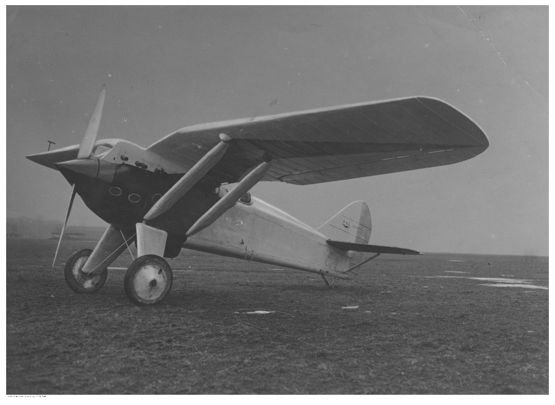 Изтребител „PZL P.1“, конструиран от Зигмунт Пулавски.